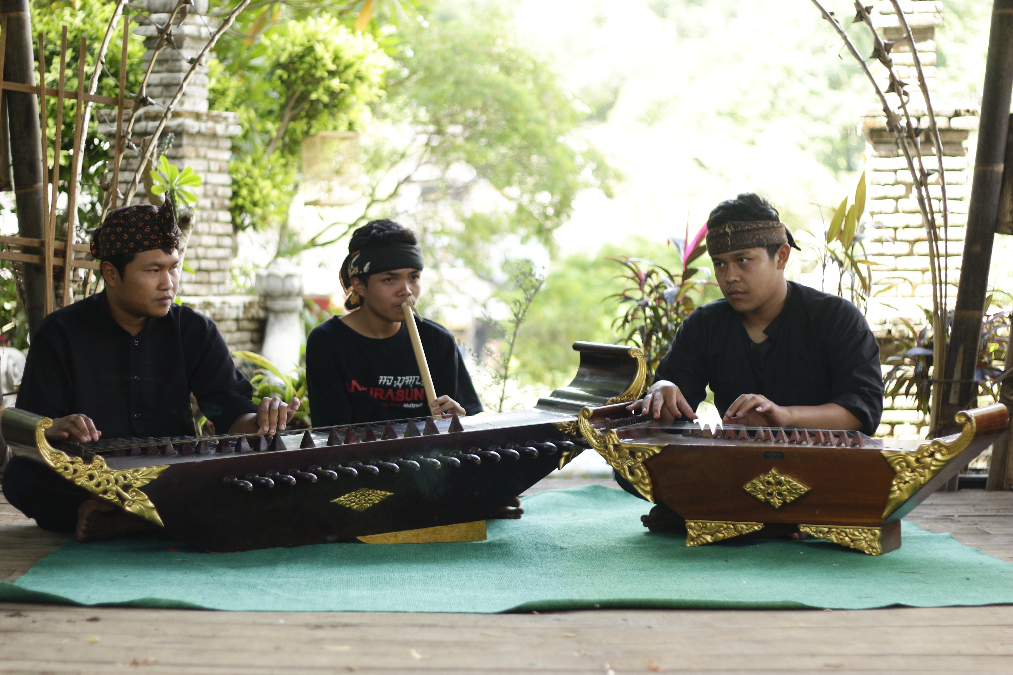 Kacapi merupakan alat musik Sunda yang dimainkan sebagai alat musik utama dalam Tembang Sunda atau Mamaos Cianjuran dan kacapi suling. Kata kacapi dalam bahasa Sunda juga merujuk kepada tanaman sentul, yang dipercaya kayunya digunakan untuk membuat alat musik kacapi. Kacapi Suling adalah suatu kotak resonansi yang bagian bawahnya diberi lubang resonansi untuk memungkinkan suara keluar. Sisi-sisi jenis kacapi ini dibentuk sedemikian rupa sehingga menyerupai perahu. Pada masa lalu, kacapi ini dibuat langsung dari bongkahan kayu dengan memahatnya. Kacapi siter merupakan kotak resonansi dengan bidang rata yang sejajar. Serupa dengan kacapi parahu, lubangnya ditempatkan pada bagian bawah. Sisi bagian atas dan bawahnya membentuk trapesium. Untuk kedua jenis kacapi ini, tiap dawai diikatkan pada suatu sekrup kecil pada sisi kanan atas kotak. Mereka dapat ditala dalam berbagai sistem: pelog, sorog/madenda, atau salendro. Saat ini, kotak resonansi kacapi dibuat dengan cara mengelem sisi-sisi enam bidang kayu. Sumber